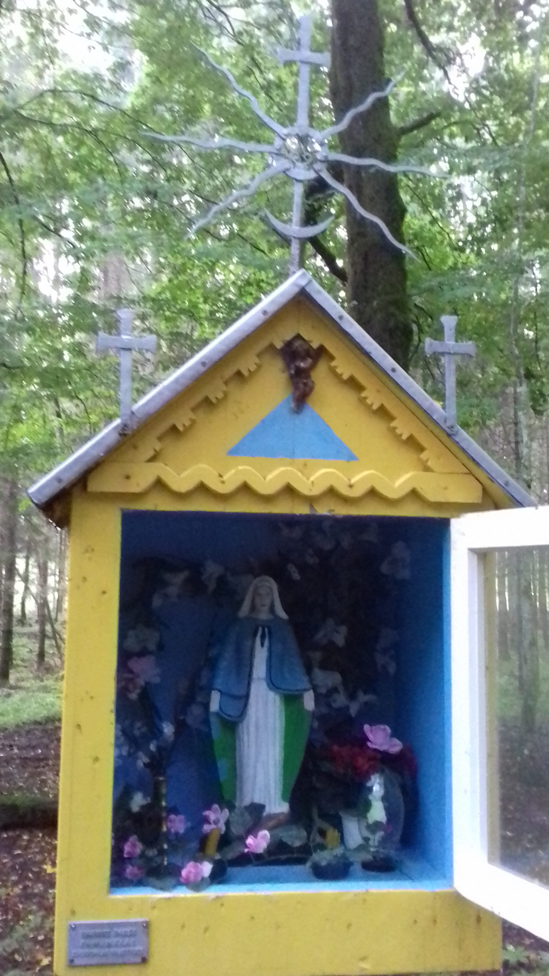 Nuotrauka daryta 2017 m. rugsėjo 13 d.